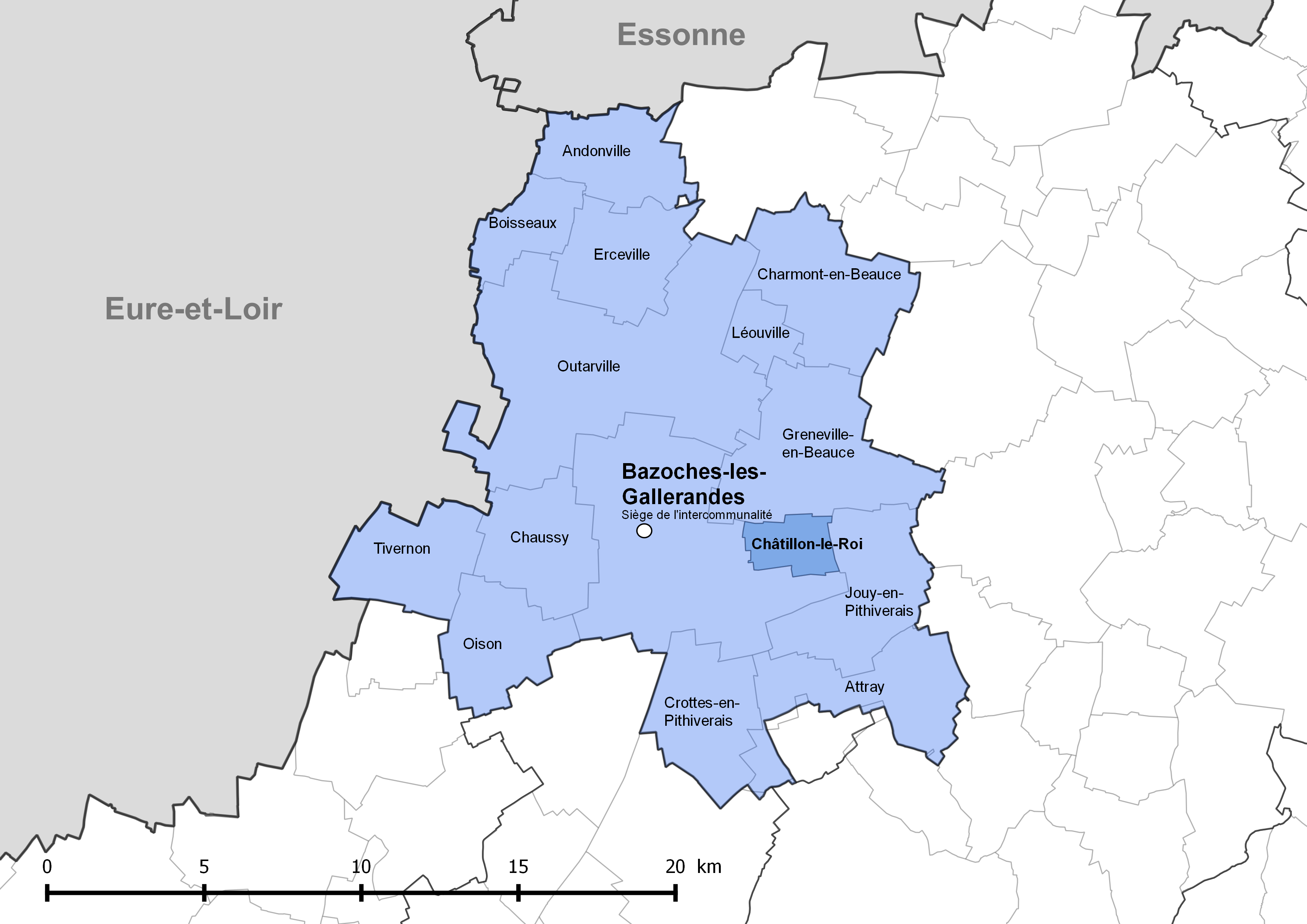 Périmètre de la communauté de communes de la Plaine du Nord Loiret - Situation de la commune de Chatillon-le-Roi.